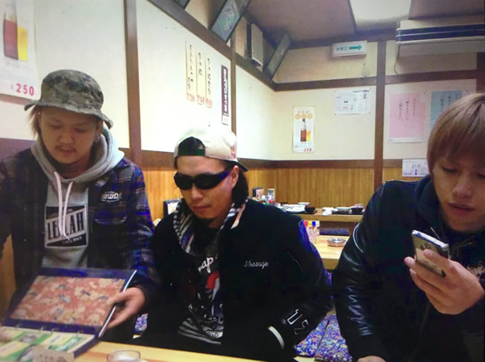 在りし日の彼ら